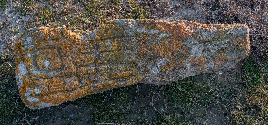 Cingirdağda üzərində damğa olan daş